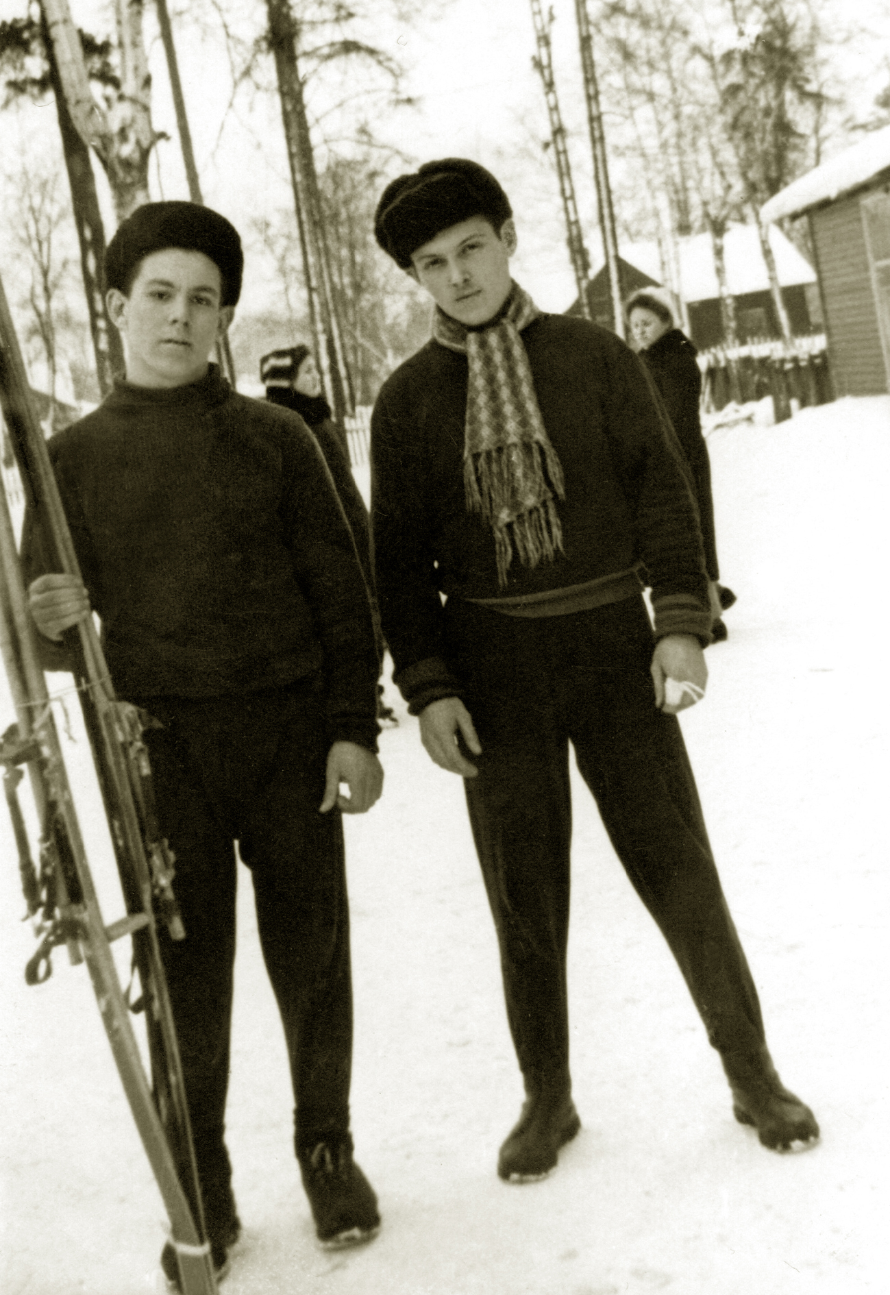 Будущие профессора Аркадий Горенштейн и Вильям Гусель в годы учёбы в ЛПМИ